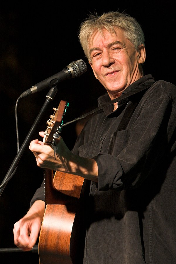 Cseh Tamás (Bakáts tér, Budapest)